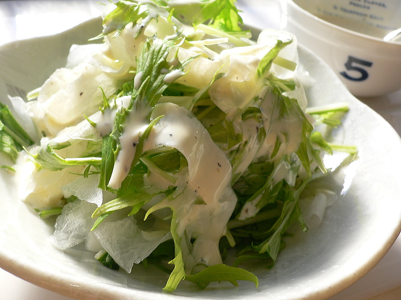 Daikon and Mizuna, salt, black pepper, vinegar, mayonnaise.